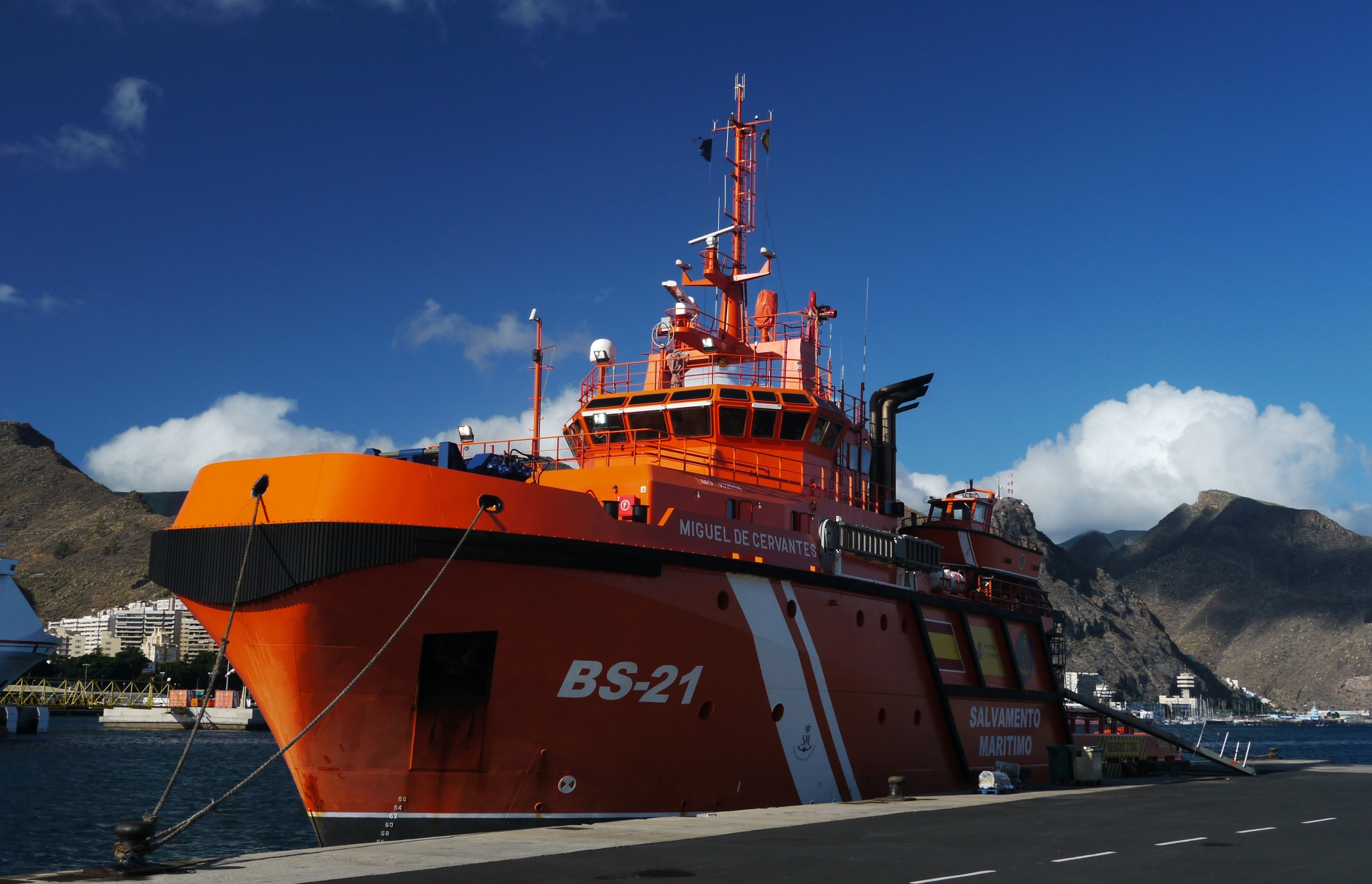 SAR Miguel de Cervantes / St.Cruz de Teneriffe